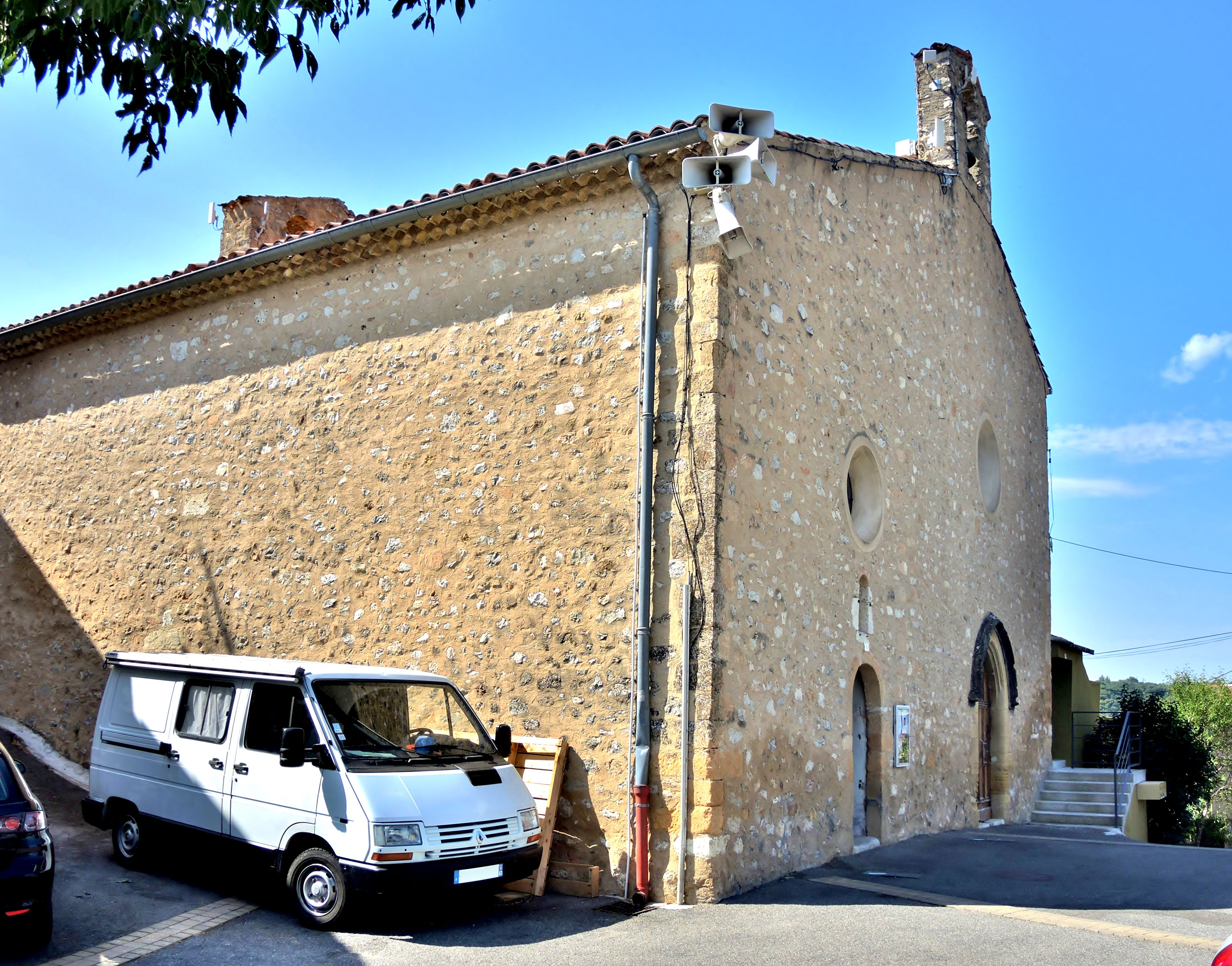 Eglise Notre-Dame de l'Assomption à Vinon-sur-Verdon. Var